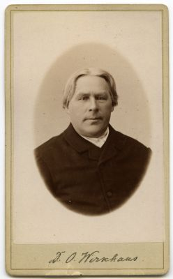 David Otto Wirkhaus